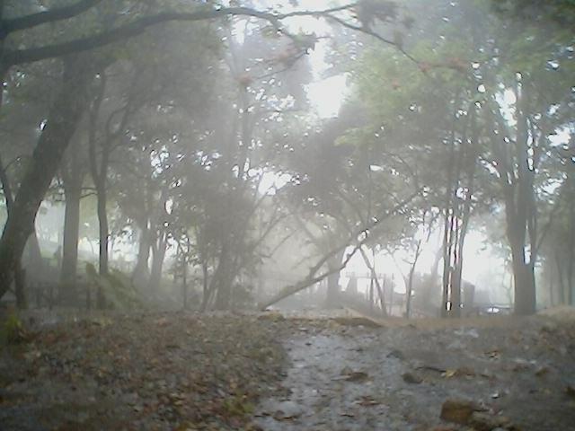 Cascada de india caru